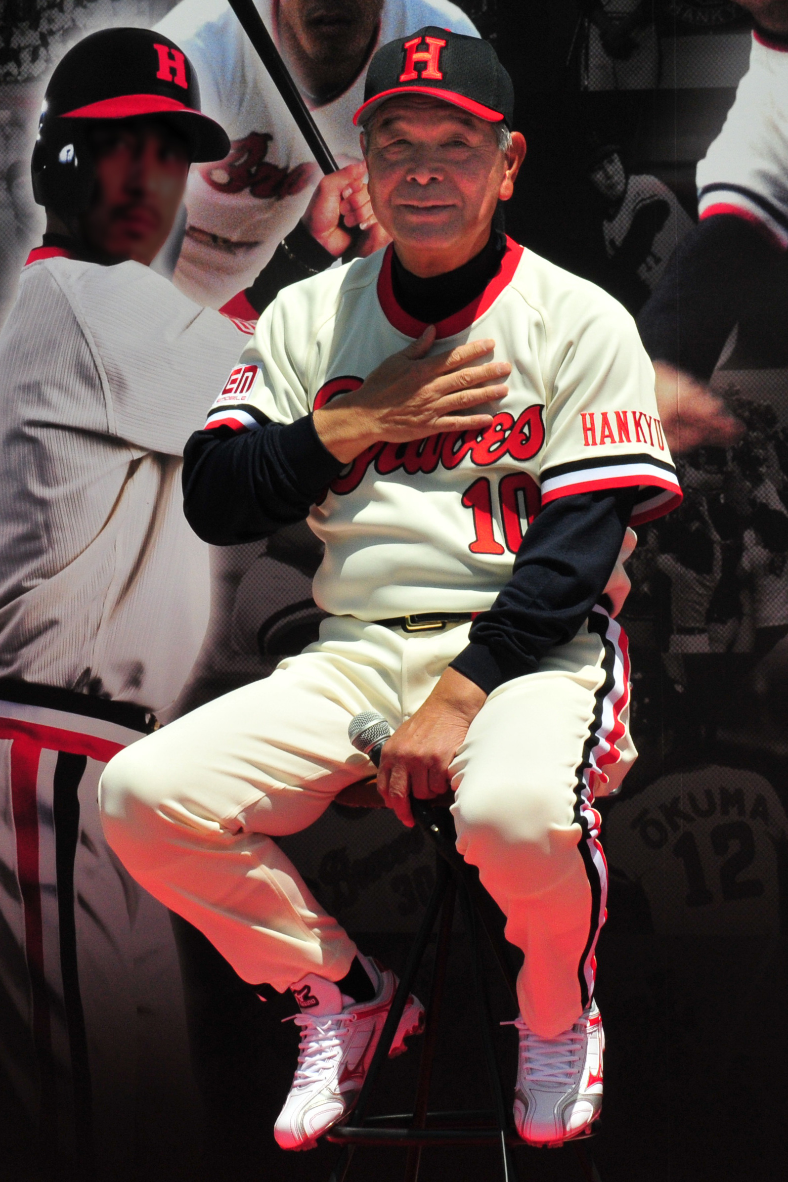 2011年5月7日「阪急ブレーブス蘇る黄金の70's」より